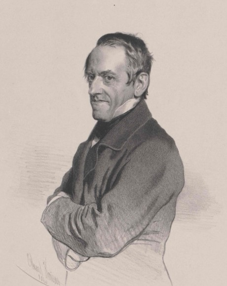 Leopold Karl Anton von Wolkenstein-Trostburg (1831 - 1893), Rakouský šlechtic a politik.